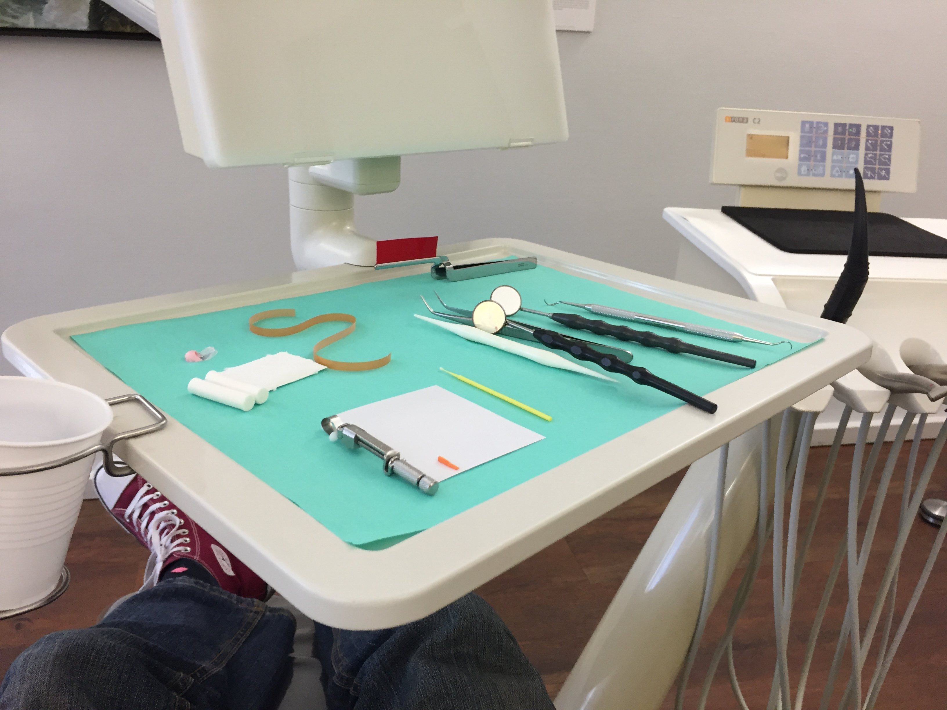 Zahnarztpraxis - Behandlungsbesteck